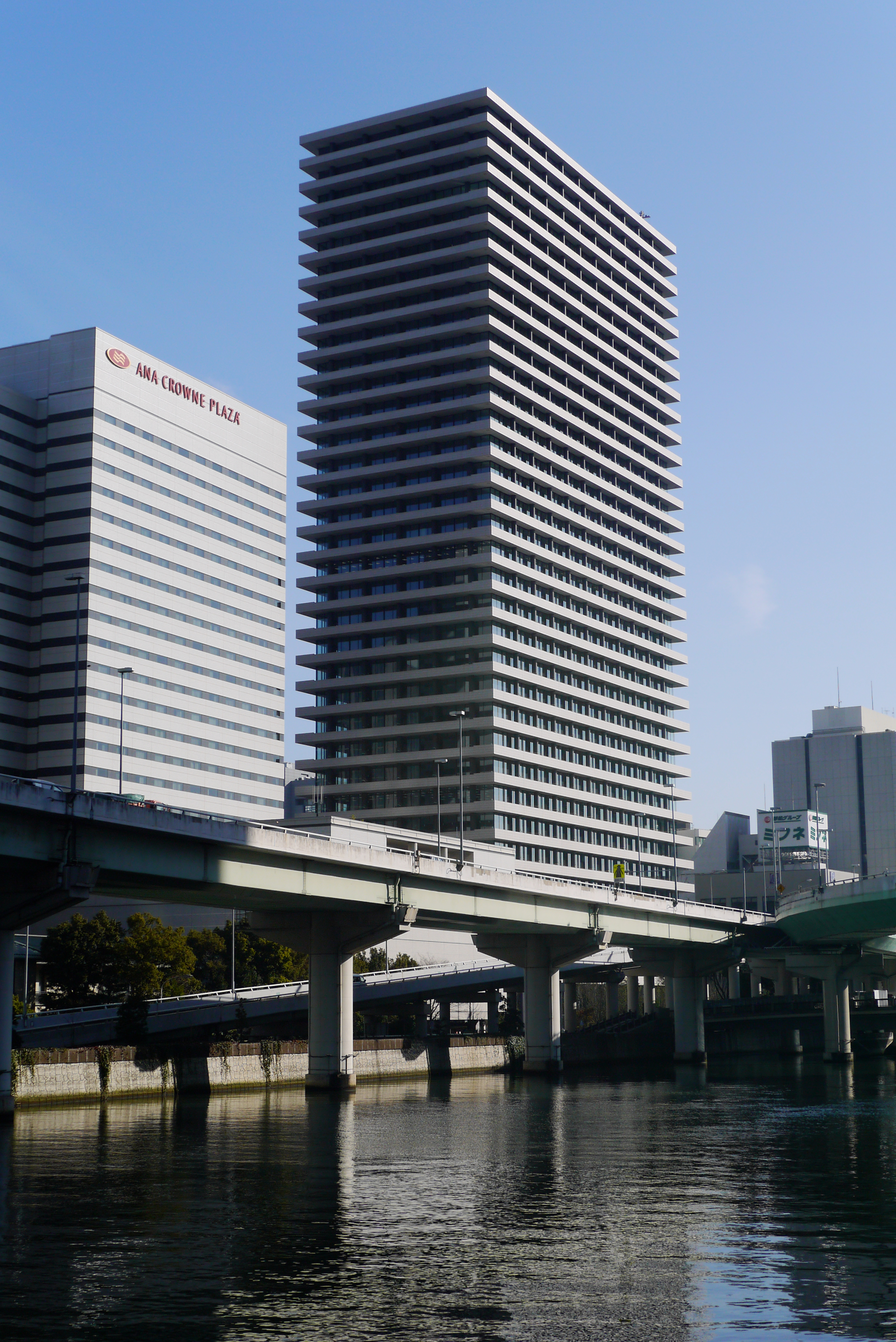 Shin-Daibiru (新ダイビル), Osaka, Osaka prefecture, Japan